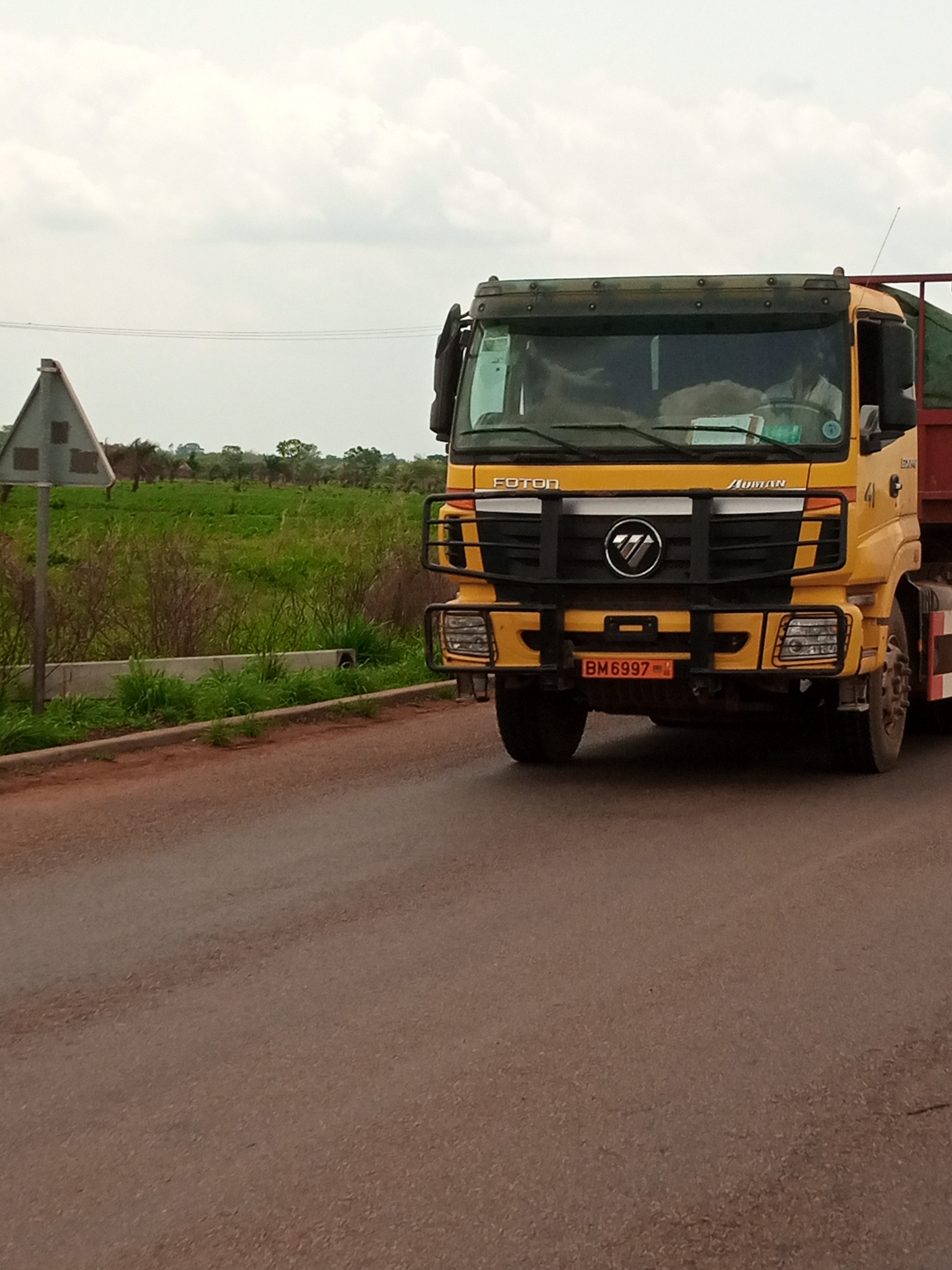 un camion en mouvement sur la voie Pobé Onigbolo This is an image with the theme "Africa on the Move or Transport" from: Benin